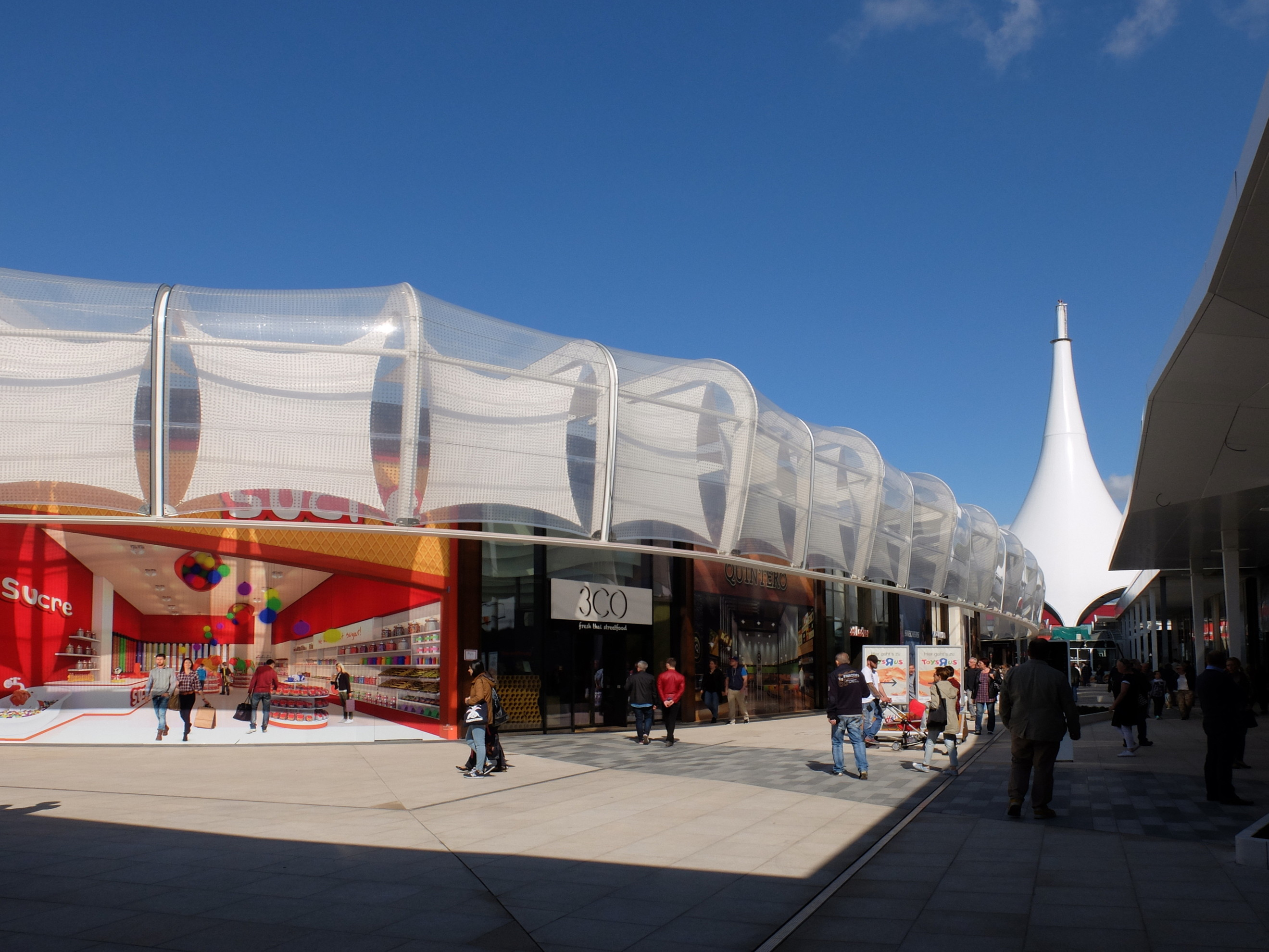 Südmall des Einkaufszentrums Ruhrpark in Bochum